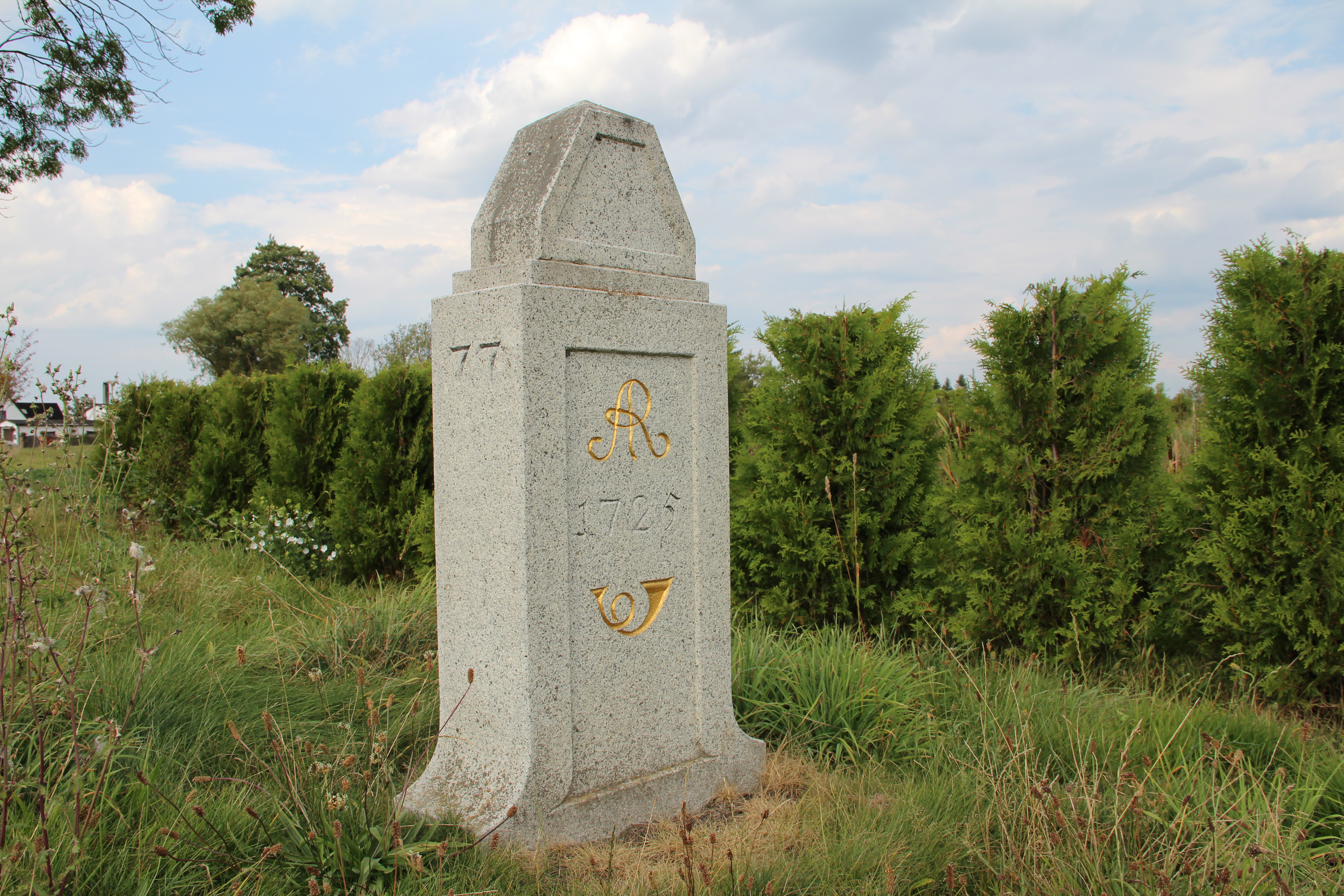 Kursächsischer Viertelmeilenstein in Adorf/Vogtland